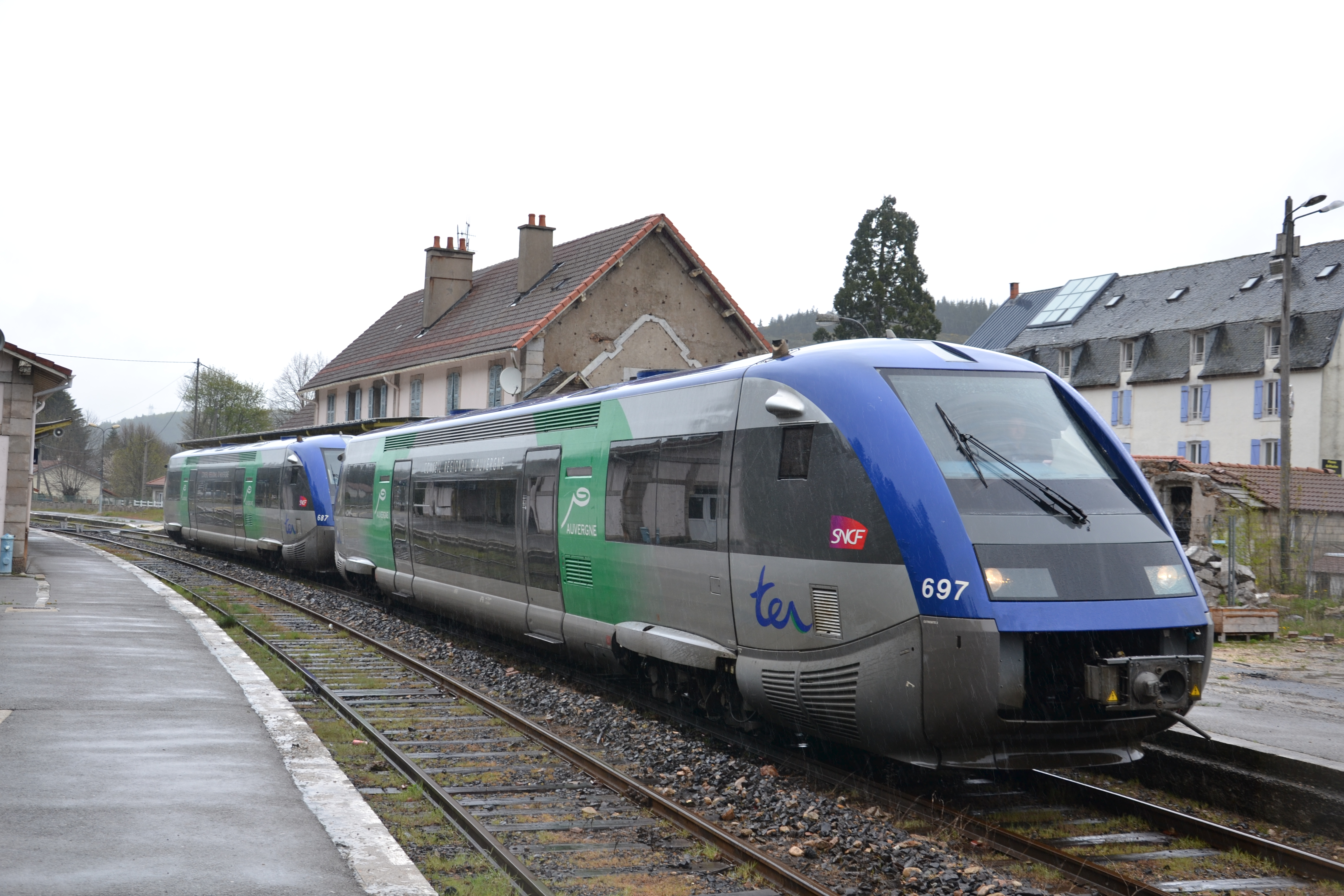 Le Cévenols remplacé par des autorails ter Auvergne marque l'arrêt en direction de Nïmes